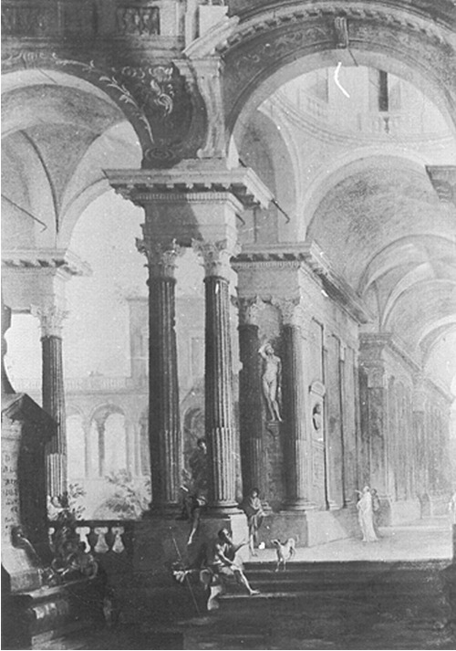 Palast mit Säulenhallen um einen Hof. Dresden, Staatliche Kunstsammlungen Dresden, Gemäldegalerie Alte Meister, Inv.-Nr. 461